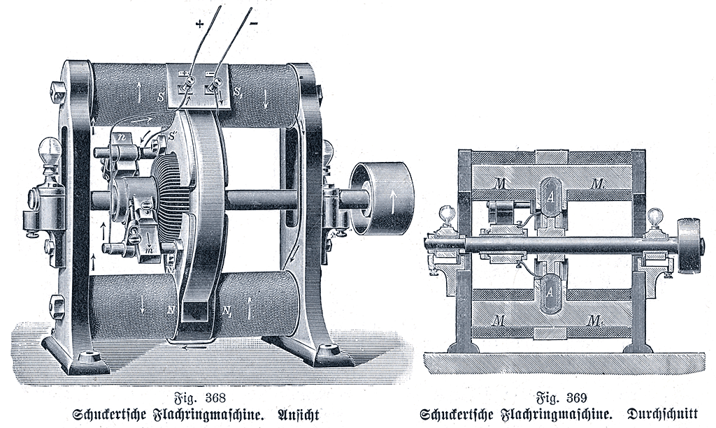 Schuckertsche Flachringmaschine